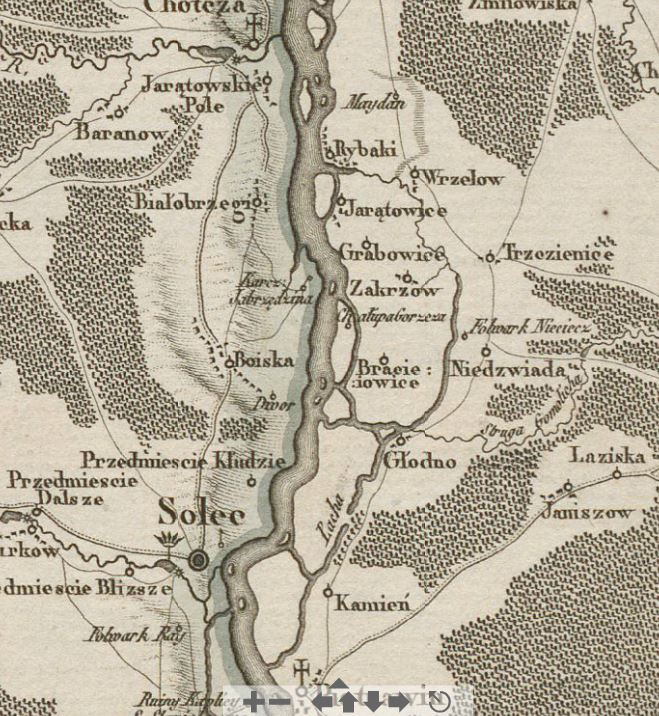 Otoczenie Goszczy na mapie z XVIII w